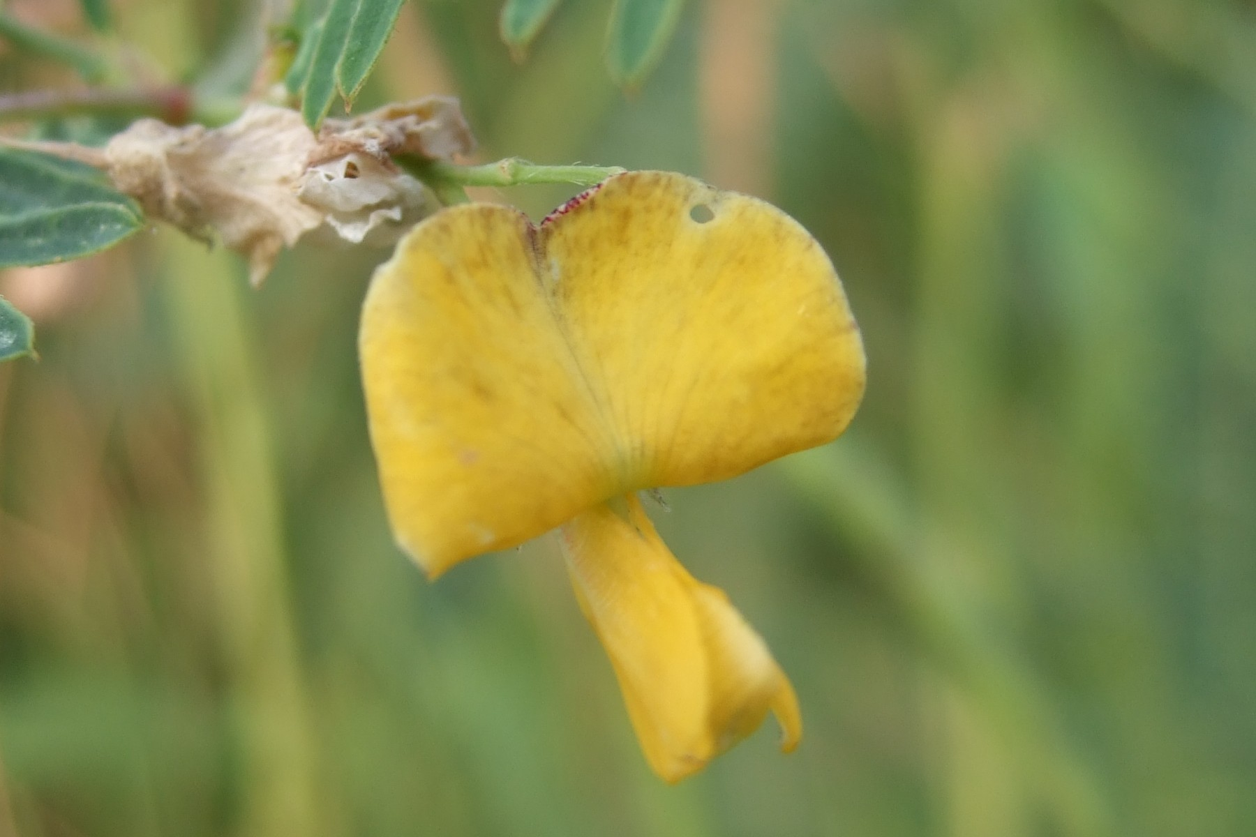 Sesbania cannabina; Tiân-cheng; 田菁